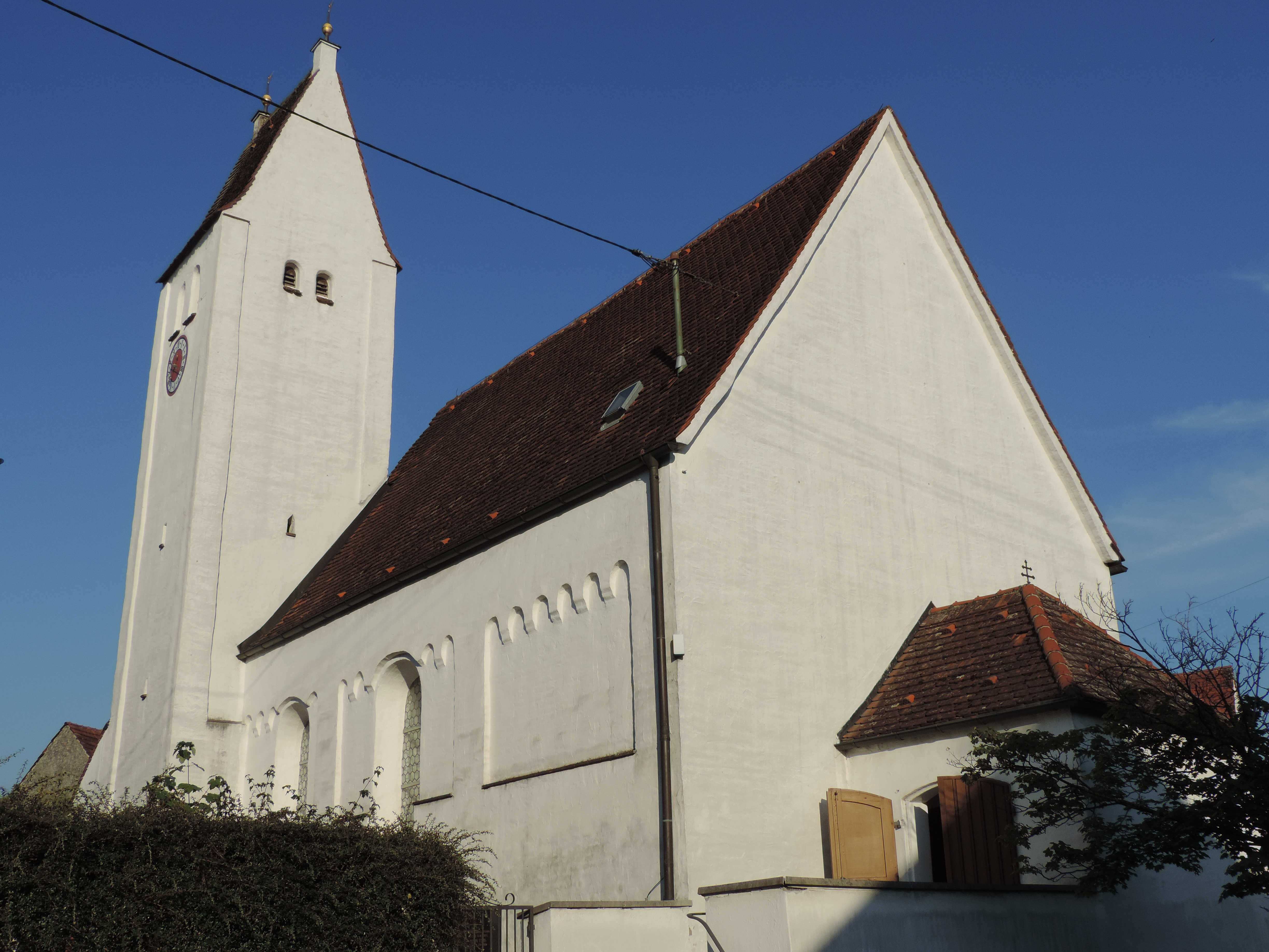 romanischer, flachgedeckter Saalbau, Straßenansicht